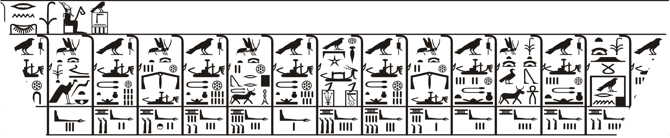 year events of king Nynetjer from the Palermo stone